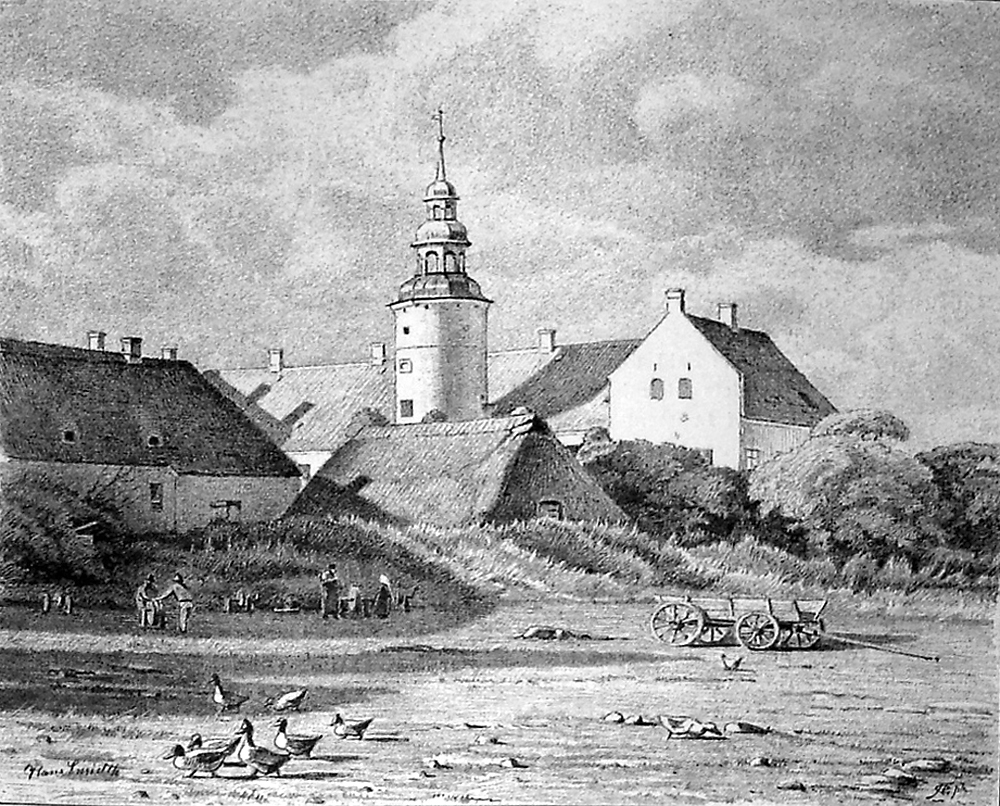 Overgård Gods i slutningen af 1800-tallet